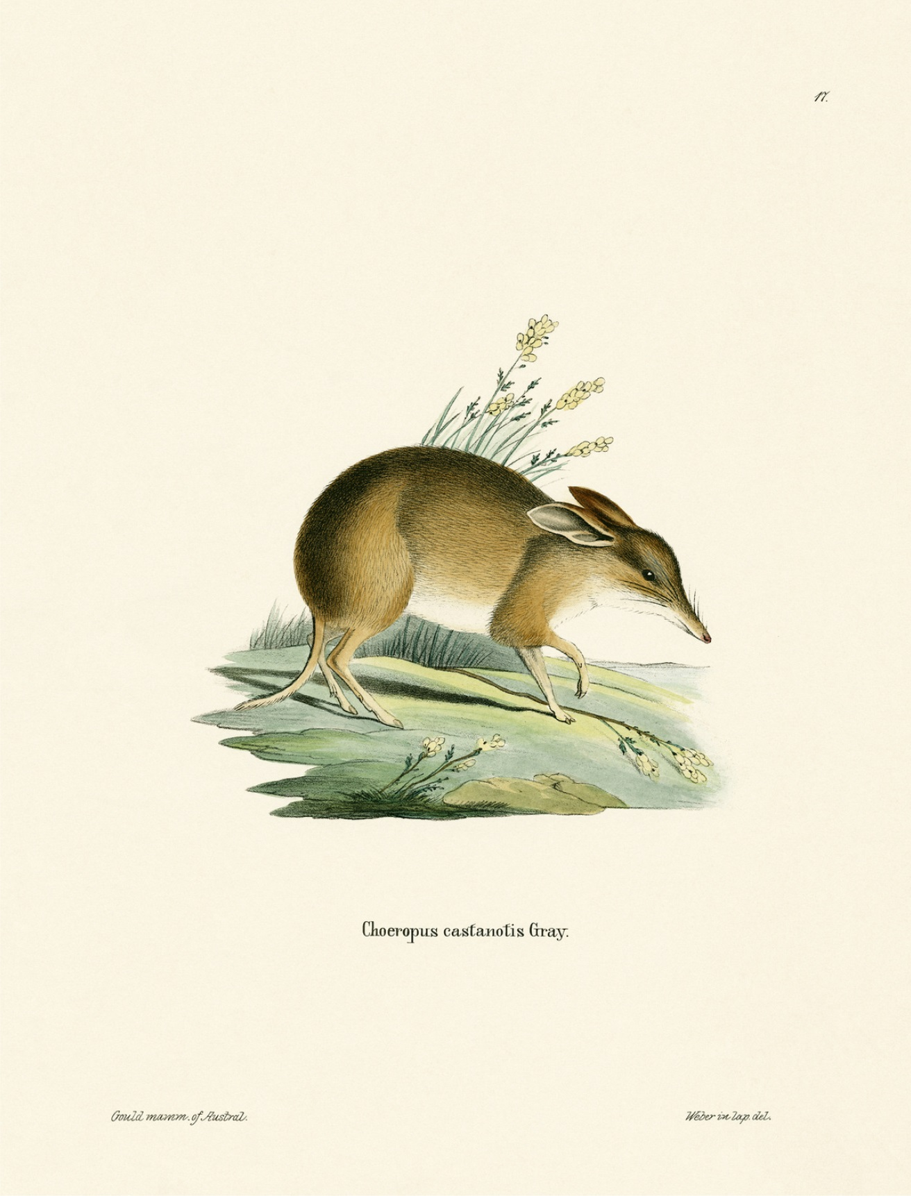 Illustrator:Weber, Engraver:Weber; From ‚Die Säugthiere in Abbildungen nach der Natur mit Beschreibungen‘, 1774-1855, published by Johann Christian Daniel von Schreber (1739-1810)